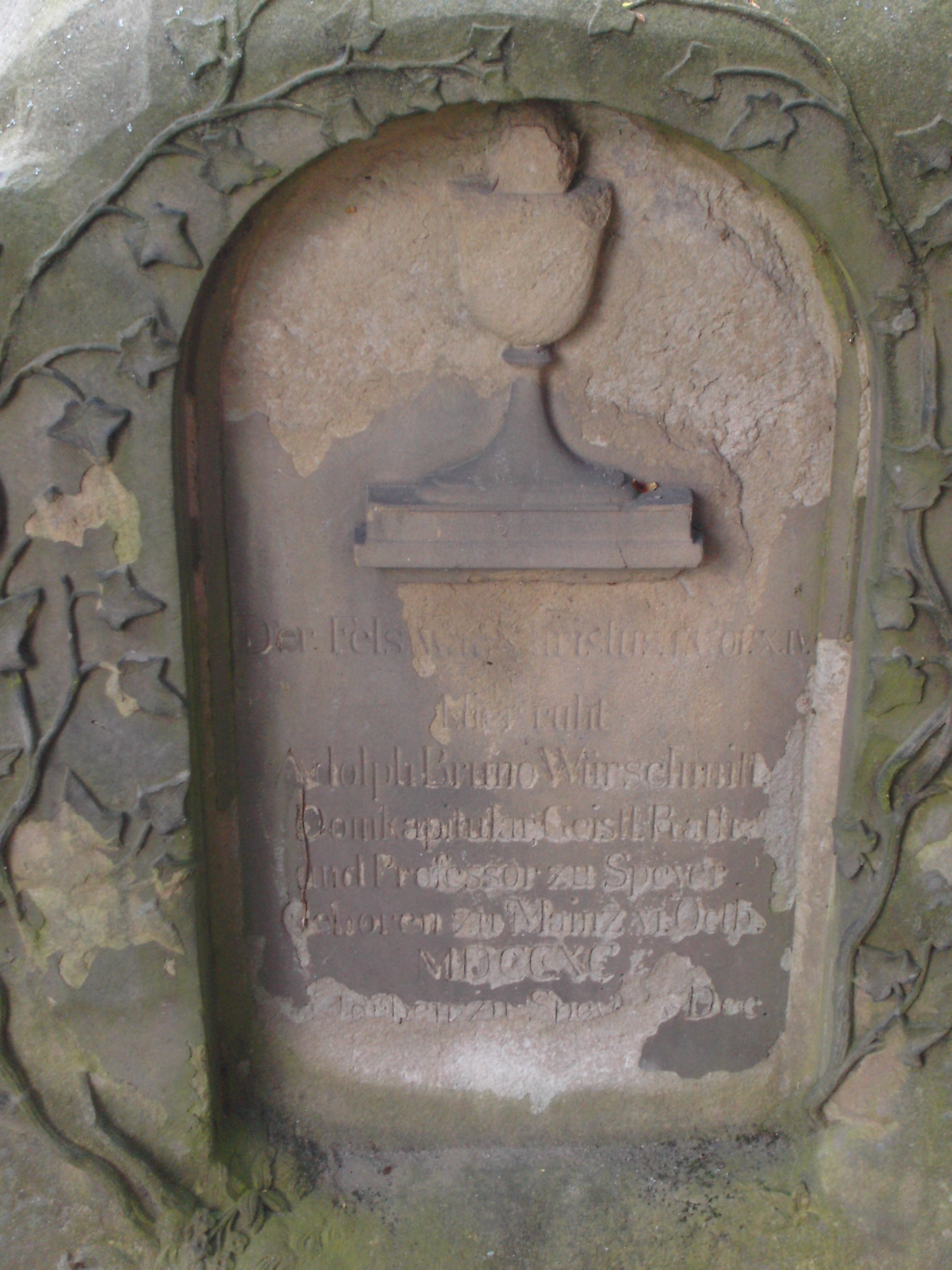 Grabstein Domkapitular Bruno Würschmitt Speyer